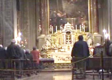 An der Karhedral vu Ferrara.